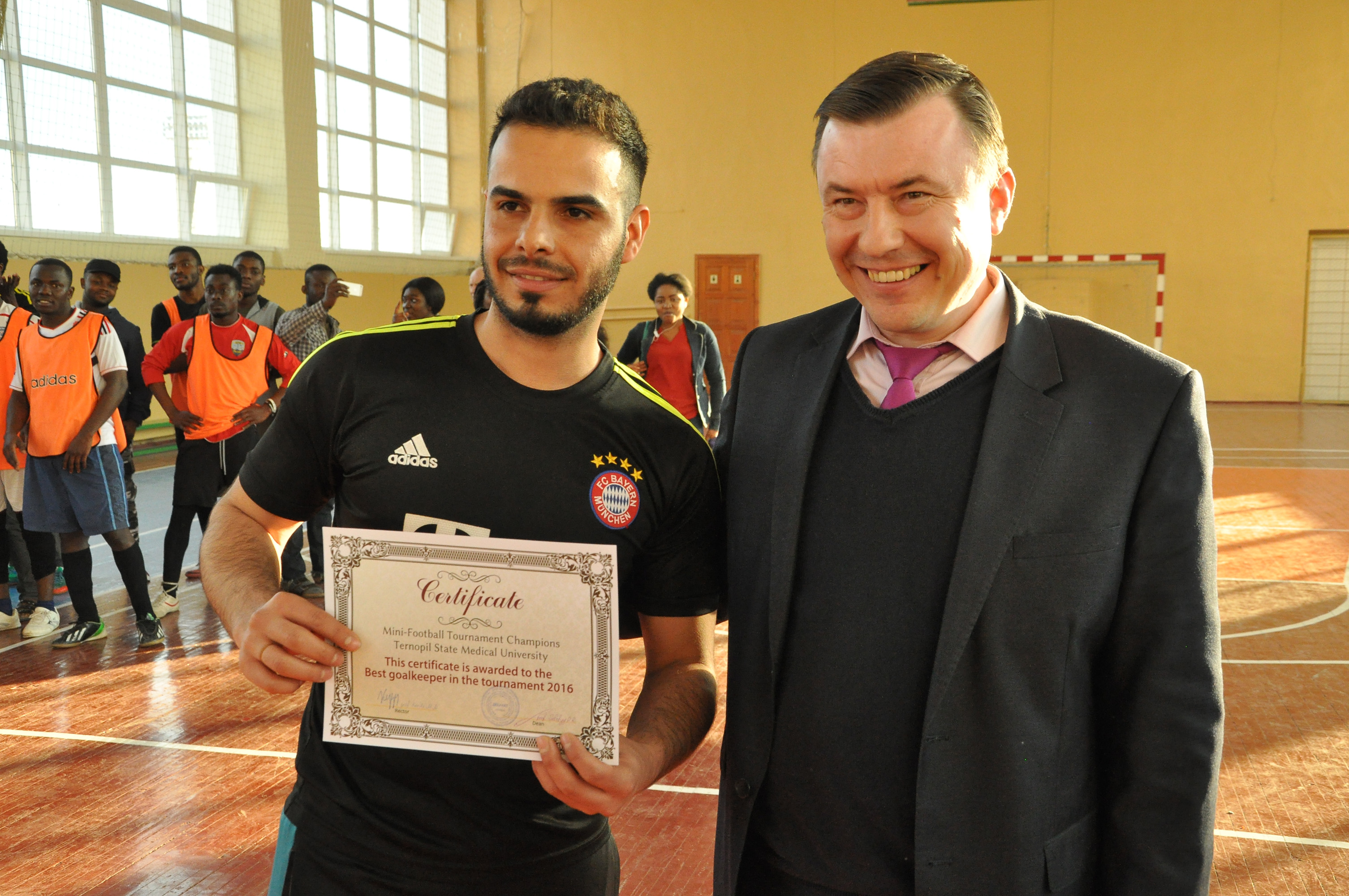 Міні-футбол «Ліга чемпіонів» Тернопільського державного медичного університету імені І. Я. Горбачевського. Півфінальні та фінальний поєдинки 26 квітня 2016 року. Нагороди вручає декан факультету іноземних студентів Петро Сельський. Найкращий воротар турніру.